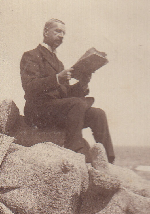 Fotografía fue tomada en 1930. Muestra a Pedro Nolasco Cruz Vergara leyendo en en balneario de Cartagena. En este balneario tenía su casa de descanso de su familia Cruz Correa.